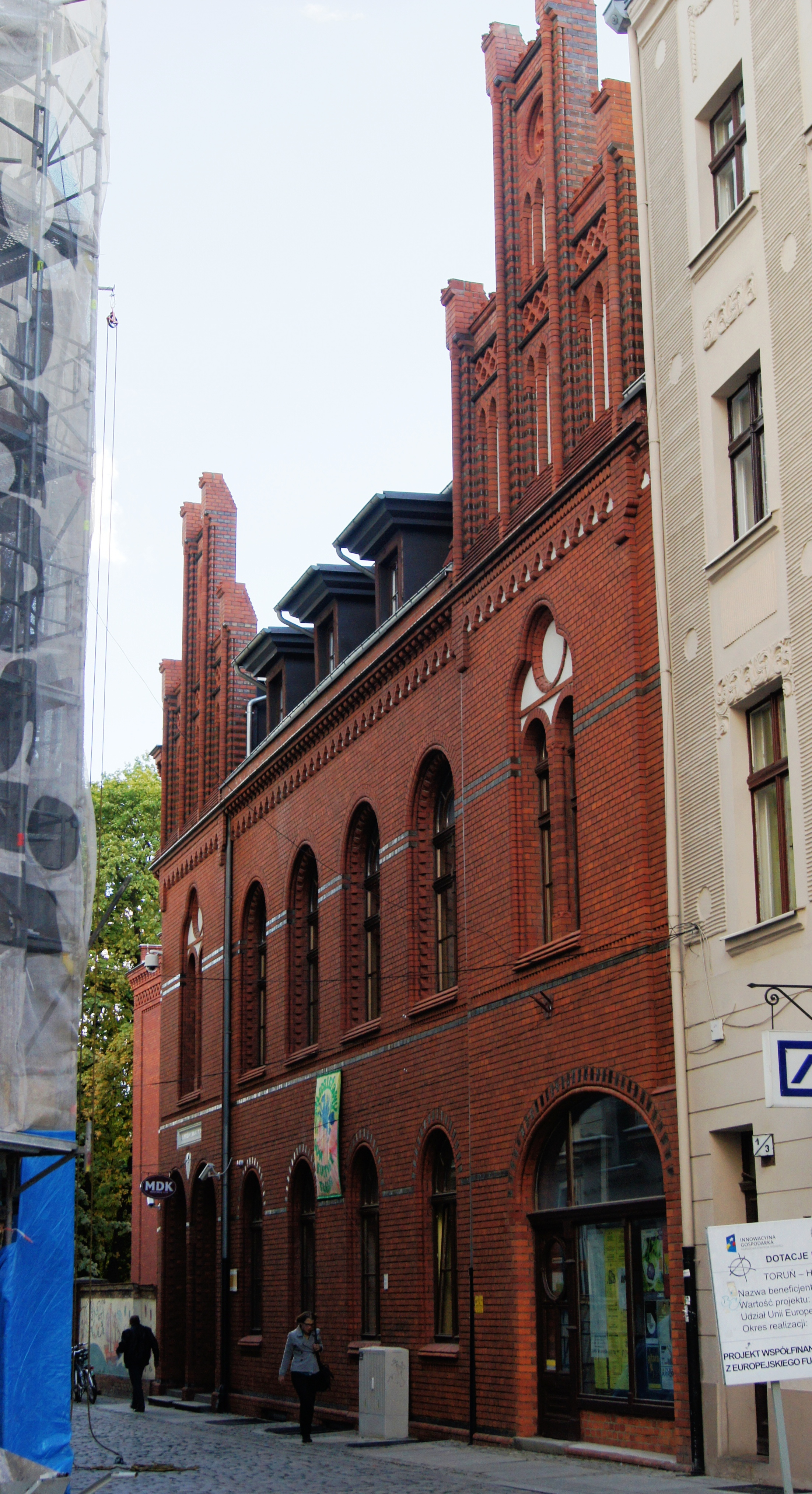 Toruń, ul. Przedzamcze 13-15 - dom Bractwa Strzeleckiego, obecnie Młodzieżowy Dom Kultury, 1892-93 (zabytek nr A/679)